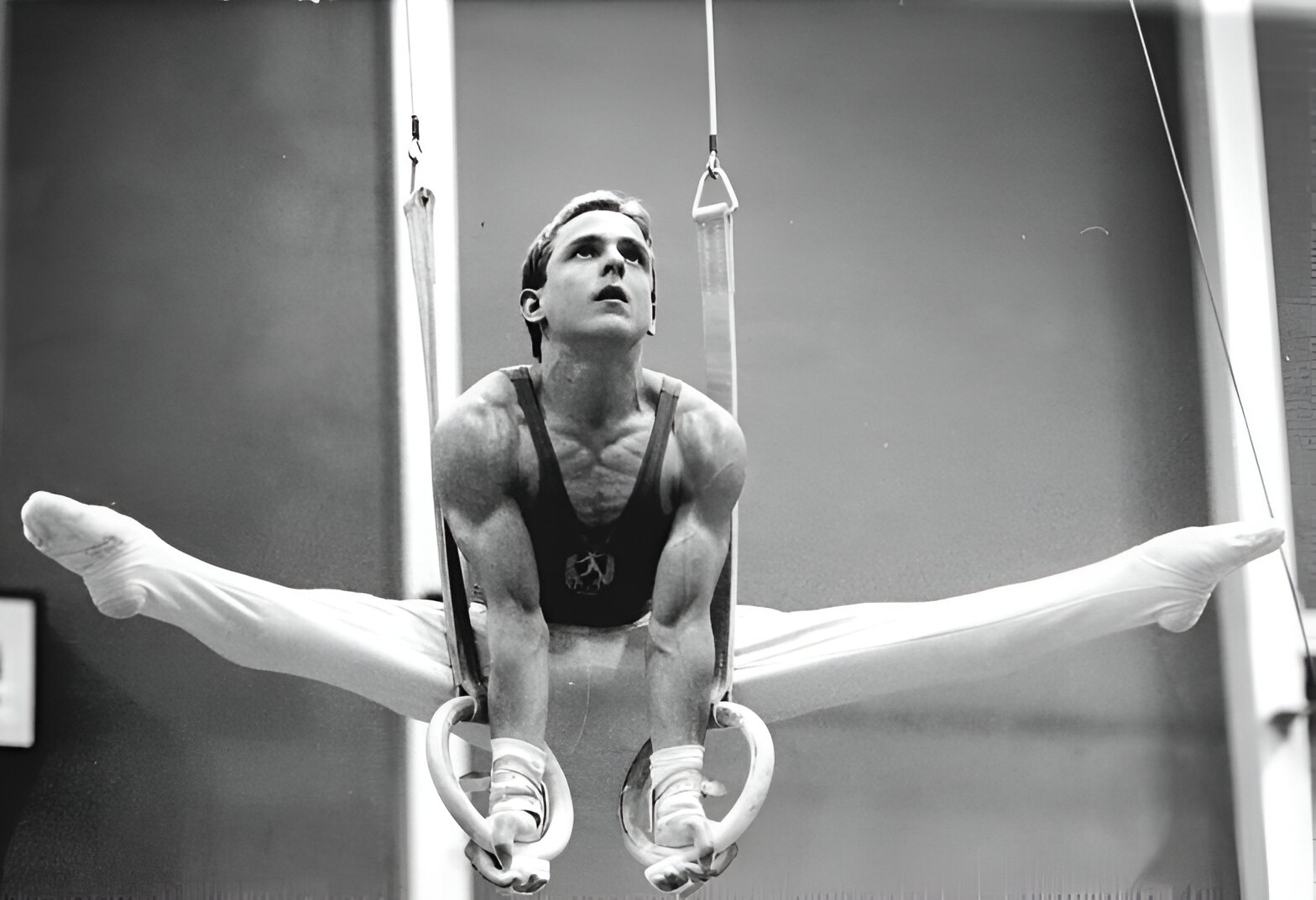 Sven Tippelt ADN-ZB Gahlbeck 5.7.86 Leipzig: 38. DDR-Turnmeisterschaften -Titelverteidiger Sven Tippelt (SC DHfK Leipzig) hat nach der Pflicht den höchsten Vorwert von 58,10 Punkten, mit dem er nun in die Kür geht. Hier bei seiner Übung an den Ringen.